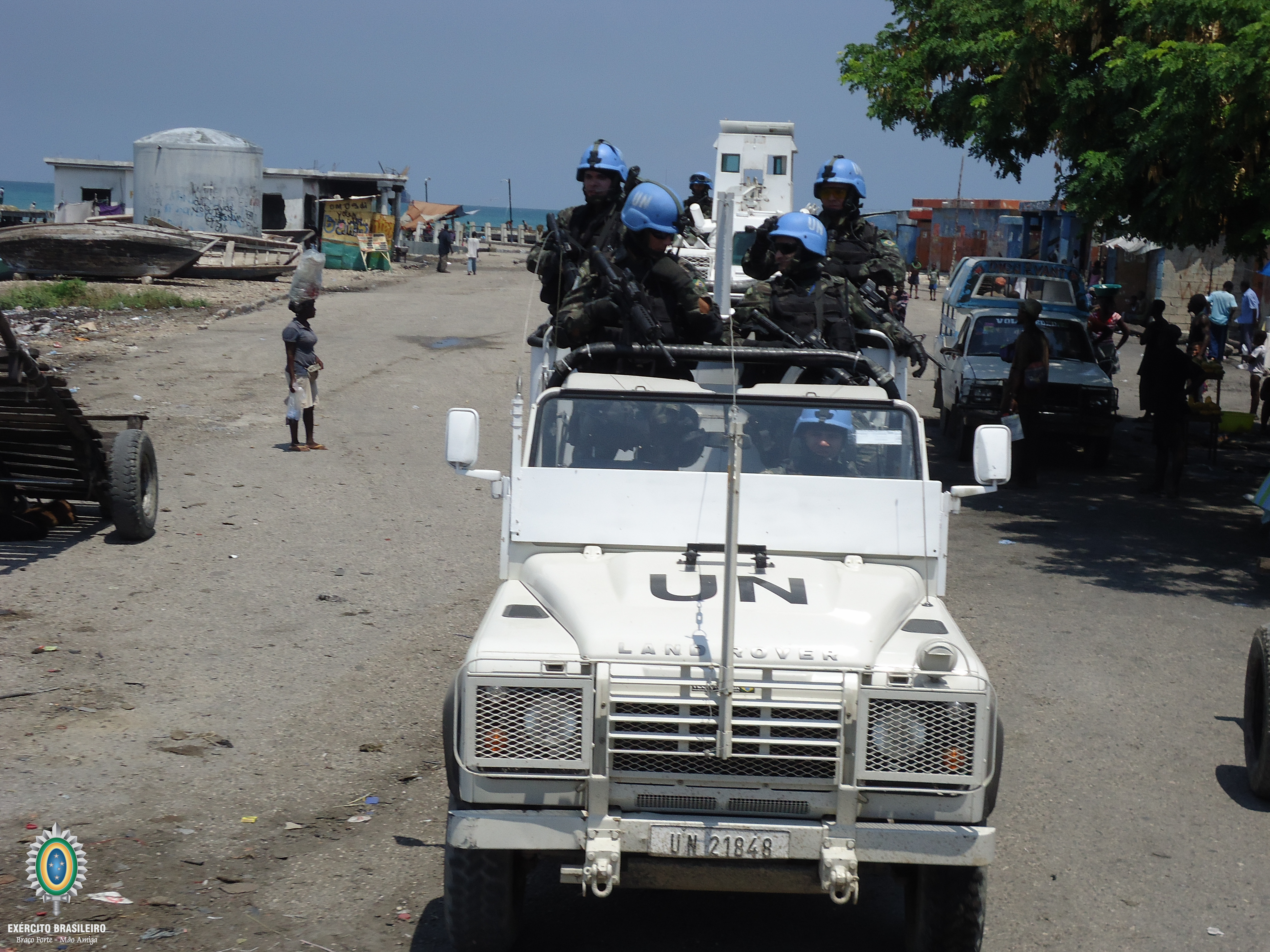 Comandos, Forças Especiais, combatente, Exército, Tiro instintivo caatinga, paraquedistas, atirador, sniper, mergulhadores